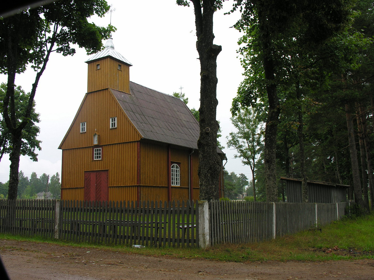 Užlieknės Marijos Magdalietės bažnyčia (past. 1857 m.), Mažeikių raj. Foto: Algirdas, 2005 m. rugpjūčio 4 d.